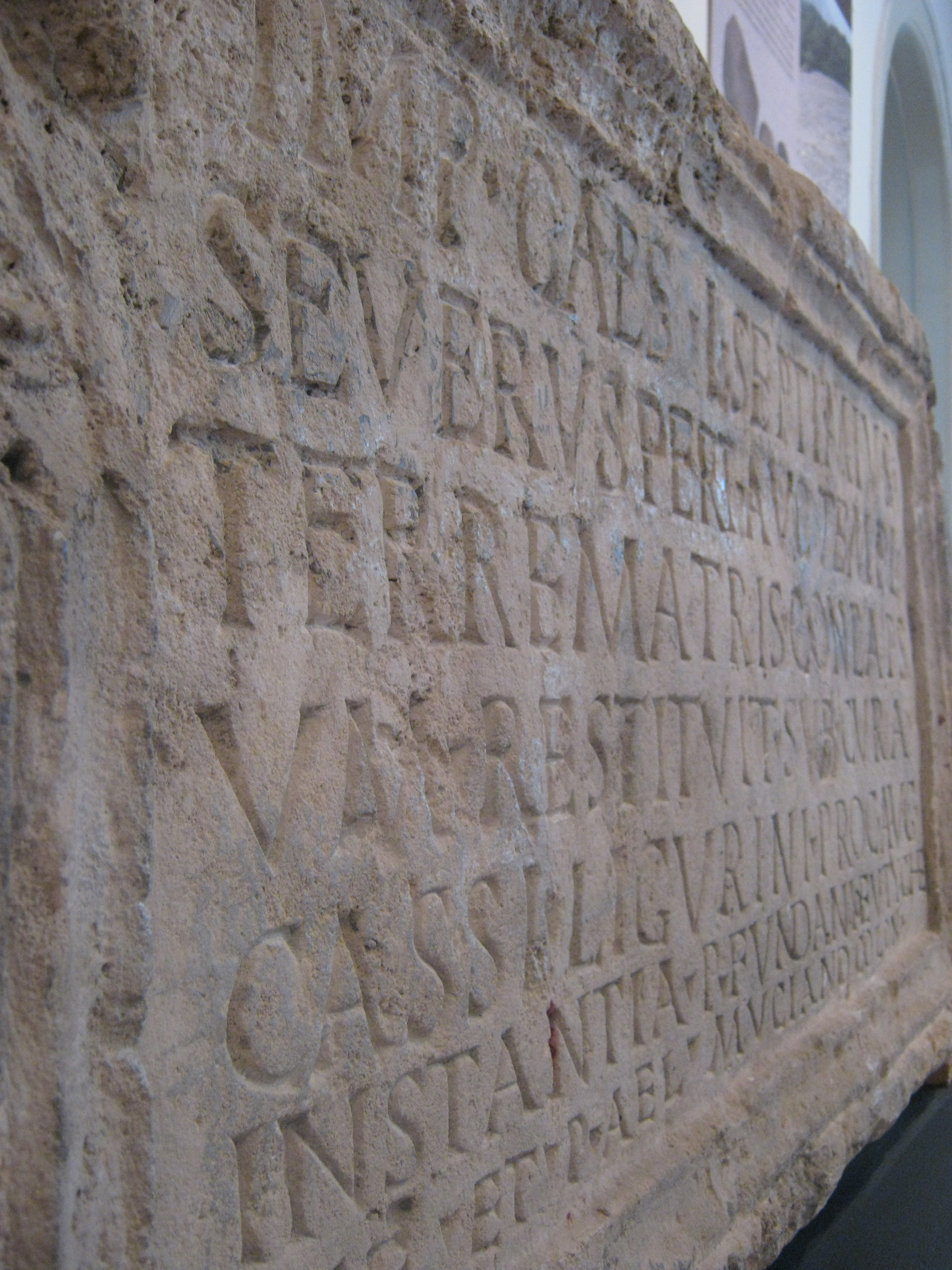 Експонати са изложбе „Средњовековни Рудник. Археолошка истраживања 2009-2014. године“, аутора Ане Цицовић и др Дејана Радичевића. Изложба је отворена у Галерији Музеја рудничко-таковског краја 22. октобра 2015. године.